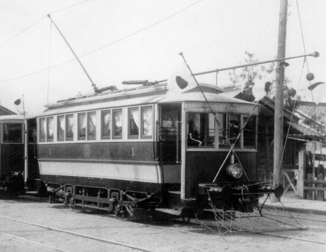 お召し電車に仕立てられたテ1号